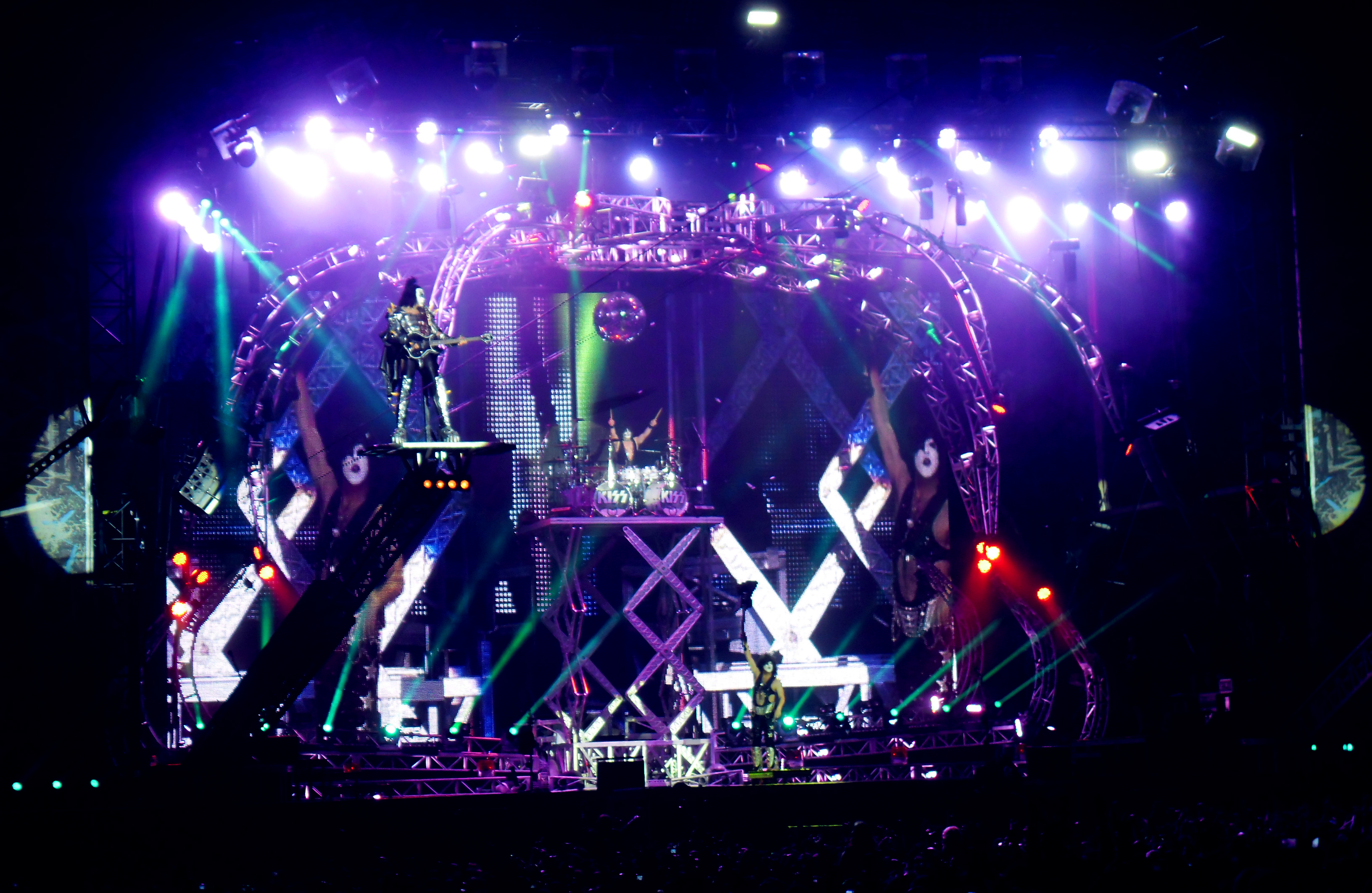 Kiss au Hellfest 2013